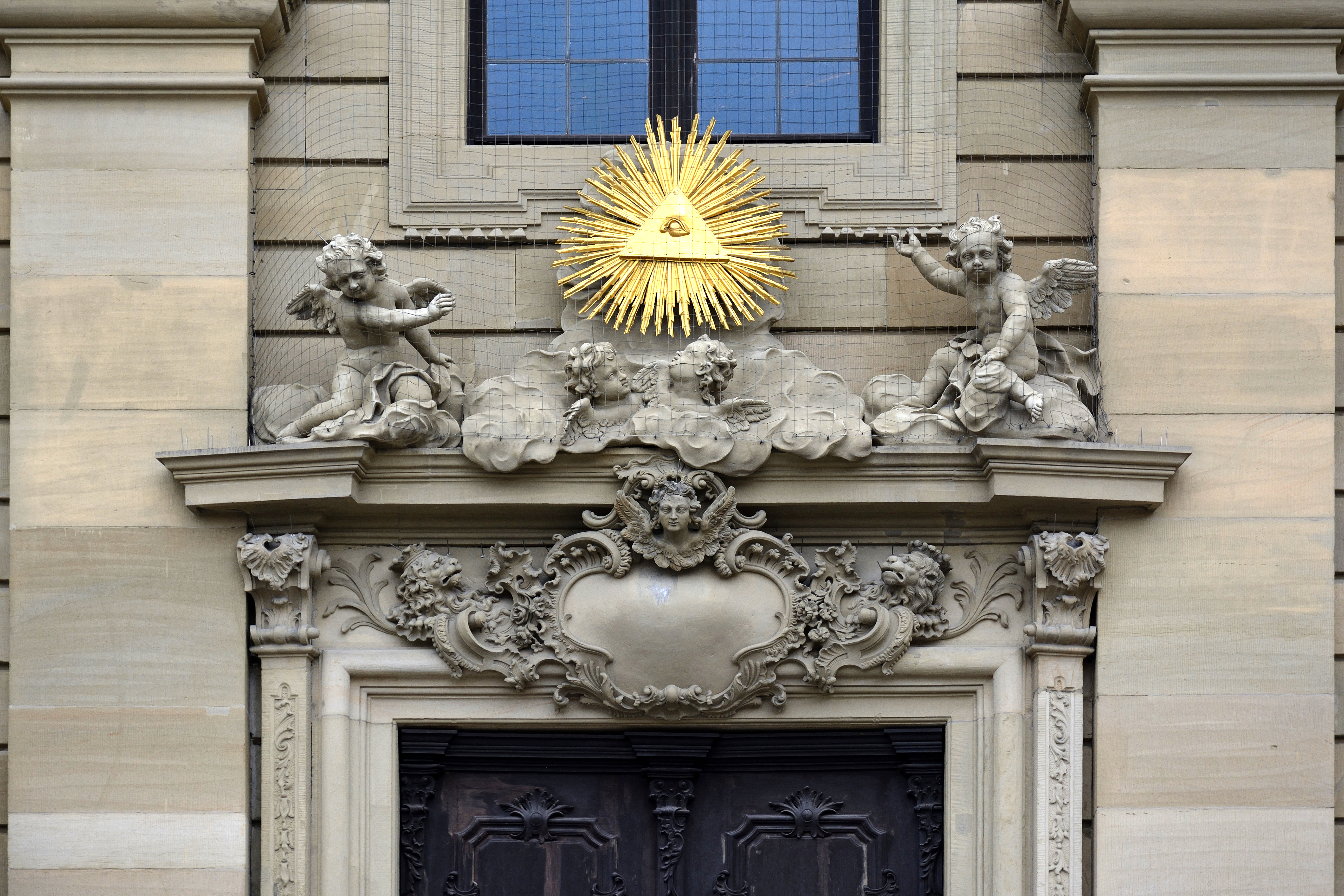 Impressionen der Residenz und dem Residenzgarten in Würzburg im April 2017